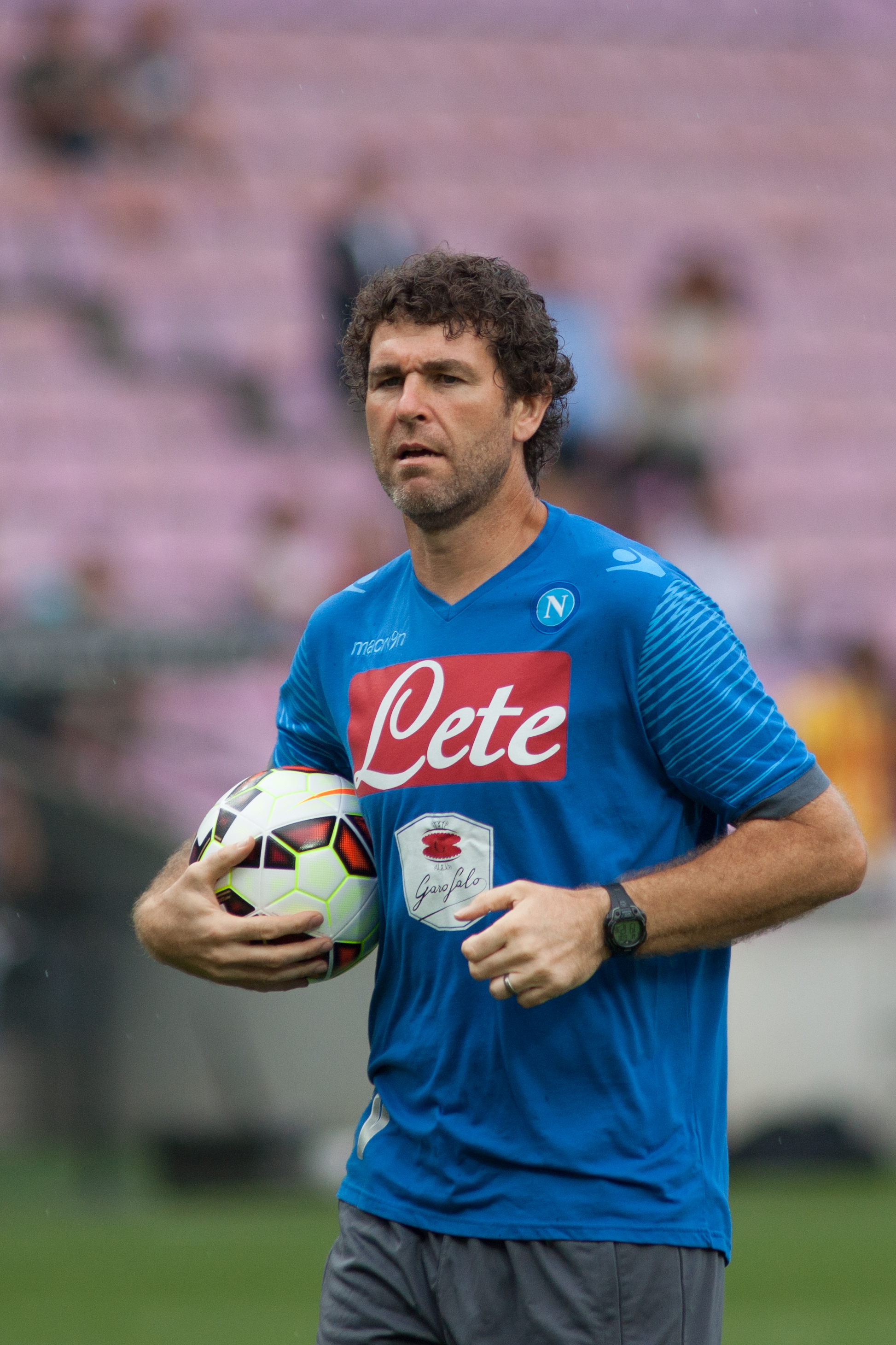 Naples vs Barcelone - Genève - aout 2014 - Xavi Valero